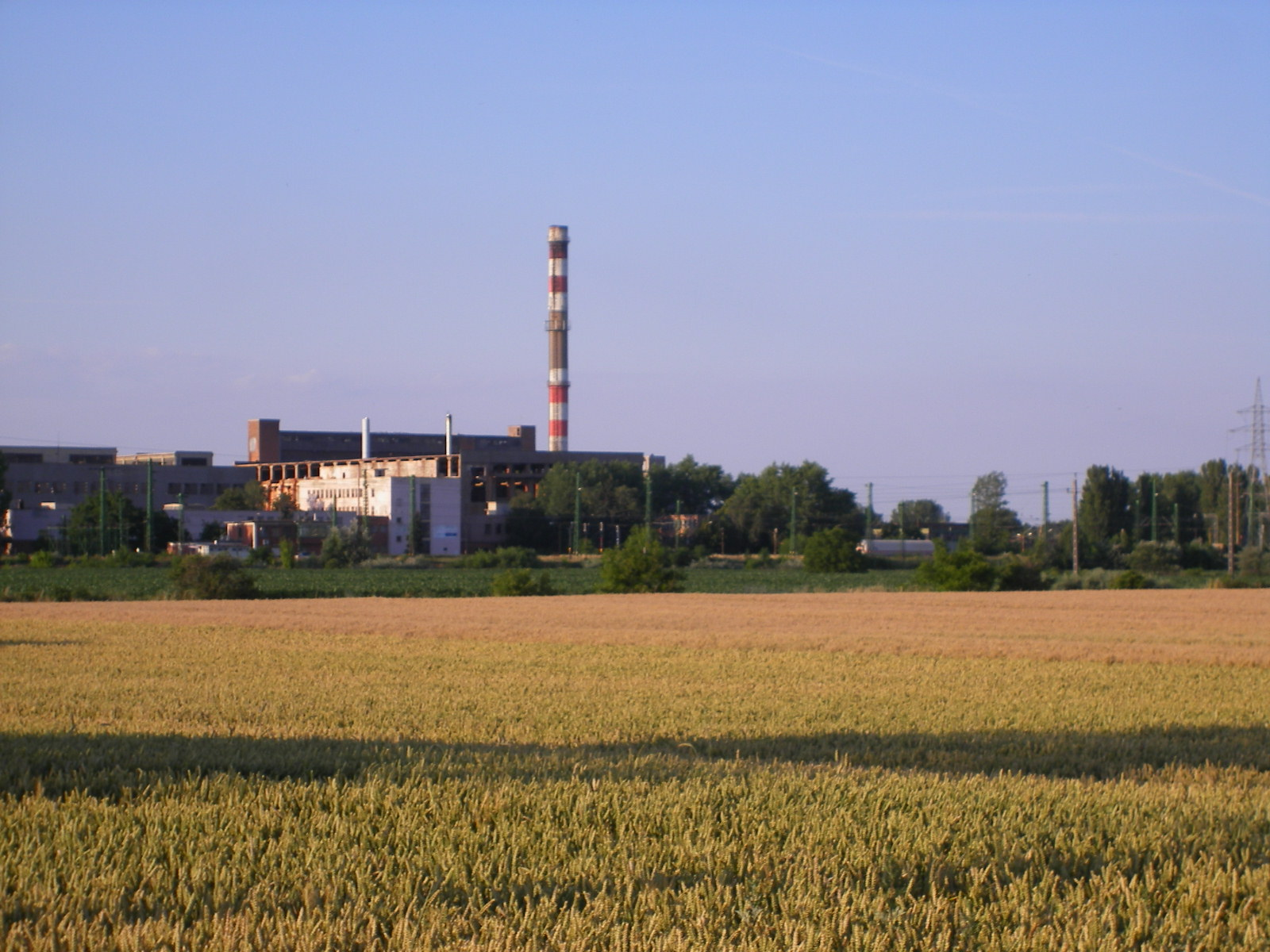 Naszály - kilátás észak felé (almásfüzitői timföldgyár)